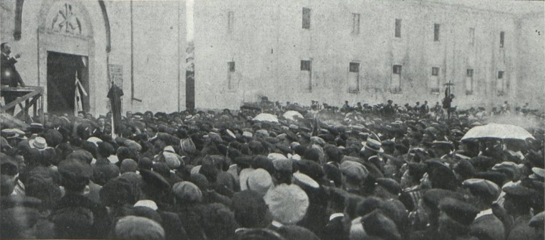 Aplec tradicionalista de Vinyoles (1912)